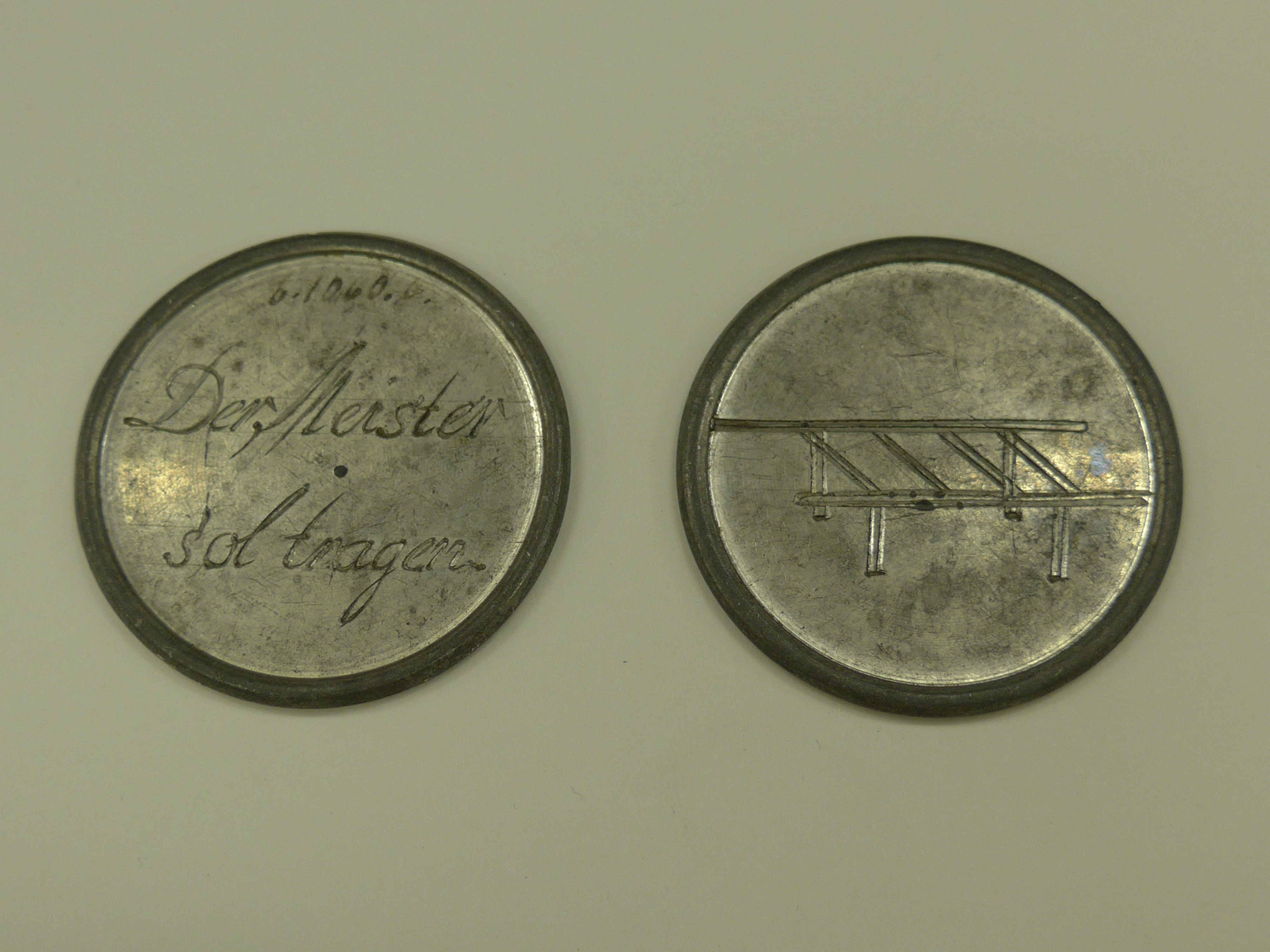 Bricke. Vorder- und Rückseite. Botenzeichen einer Sterbekasse an die Mitglieder, die an der Reihe waren, den Sarg zu tragen. Zinn, graviert, Dm 5,5 cm. Bremen, 1. Hälfte des 19. Jhdts. Focke-Museum Bremen, Inv.Nr. D.1060